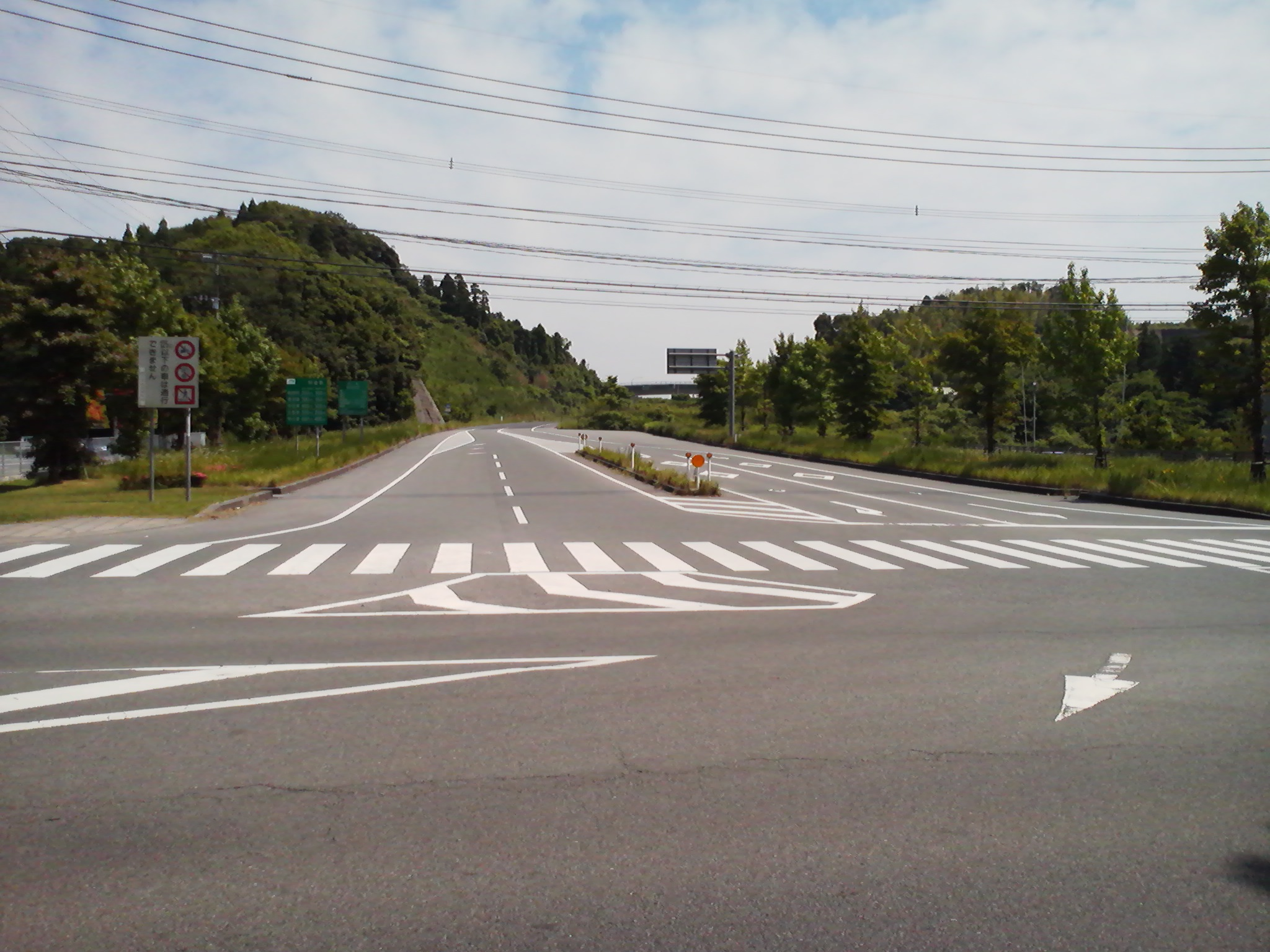 伊集院インターチェンジの入口付近